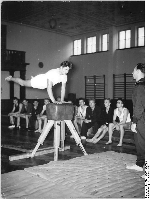 Leipzig, DHfK, Übung am Bock Zentralbild Müller-Bey-Ho. 19.10.1955 5 Jahre Deutsche Hochschule für Körperkultur. UBz: Studenten des ersten Studienjahres bei den Übungen am Bock, der die Vorstufe für das allgemeine Geräteturnen bildet. (Siehe unseren Begleittext: "5 Jahre Deutsche Hochschule für Körperkultur").